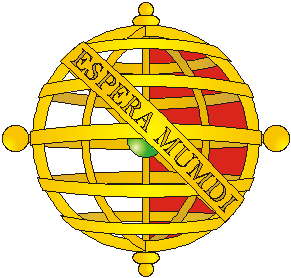 António Manuel Gomes de Sousa